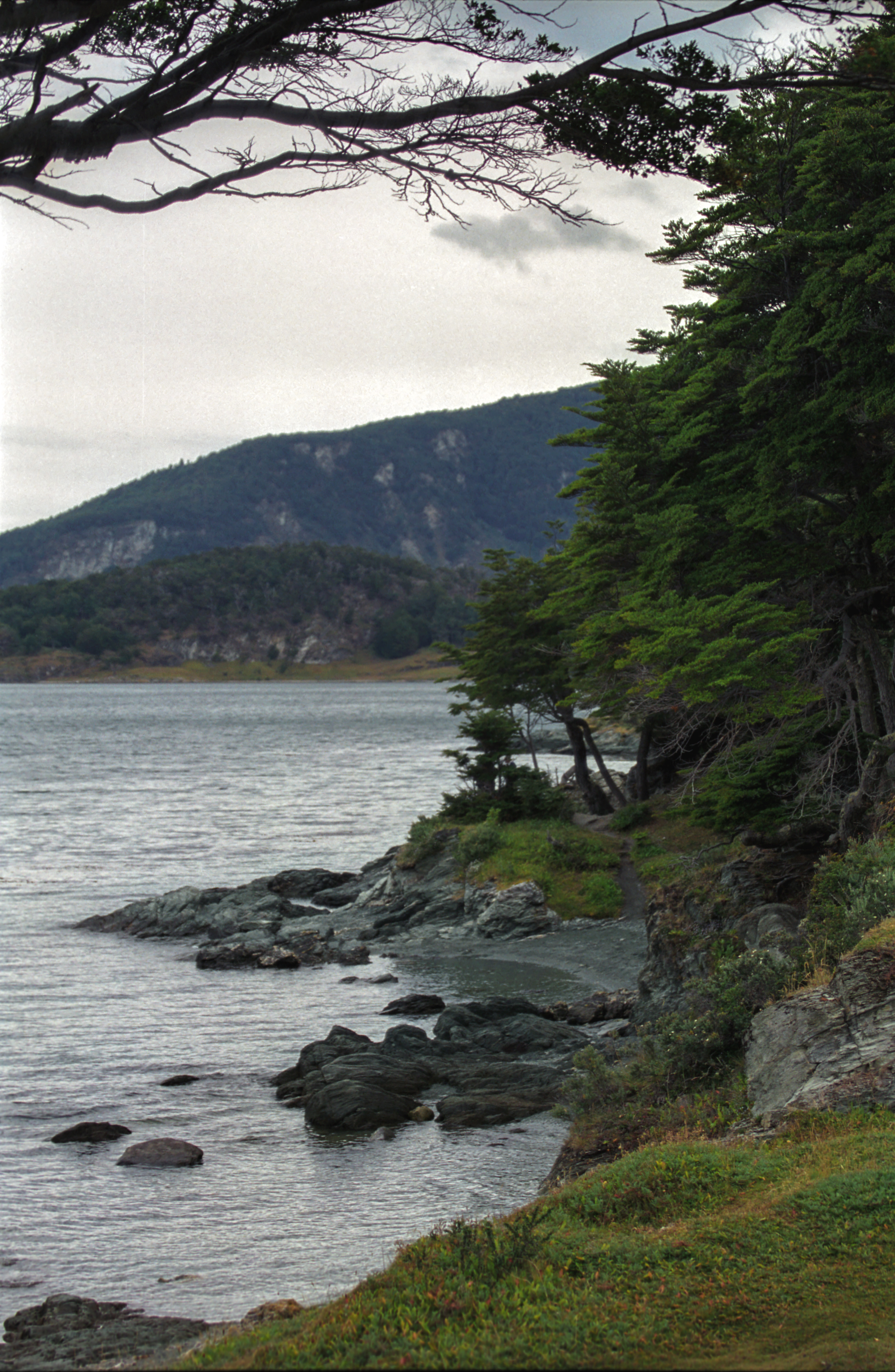 Park Narodowy Ziemi Ognistej